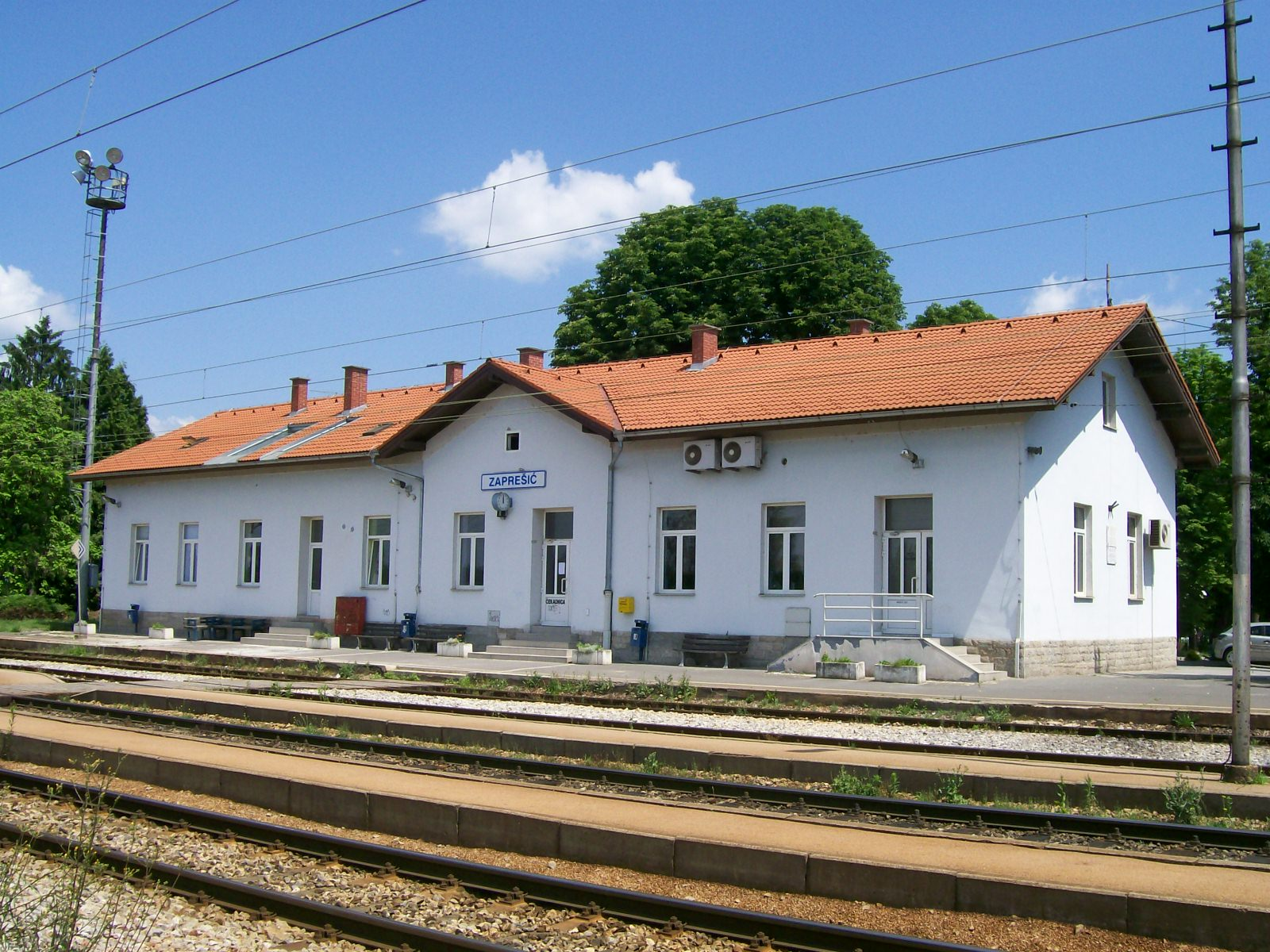 Željeznički kolodovor Zaprešić